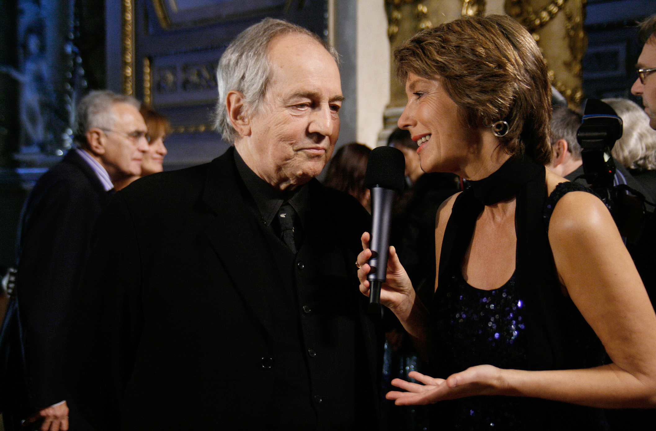 Barbara Rett interviewt Otto Schenk für den Österreichischen Rundfunk; Verleihung des Nestroy-Theaterpreises 2010 im Burgtheater in Wien.